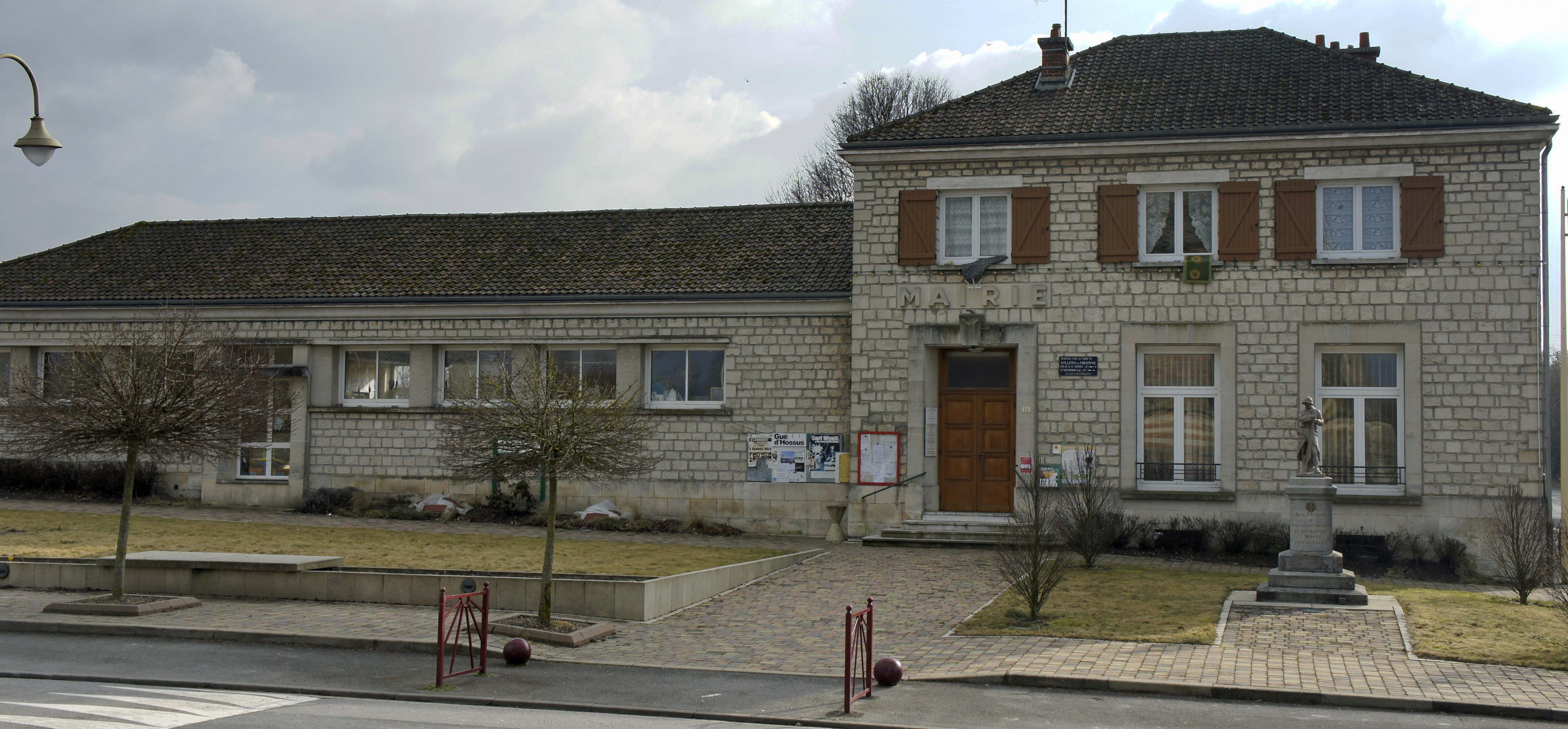 Villers en Argonne, vue de la Mairie.